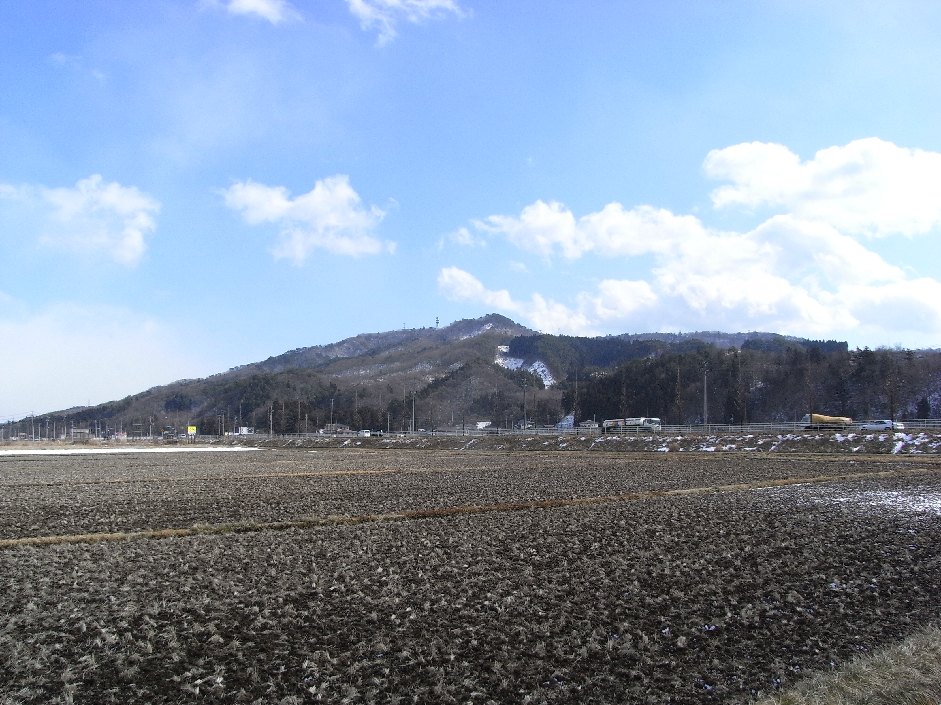 Banzan hills